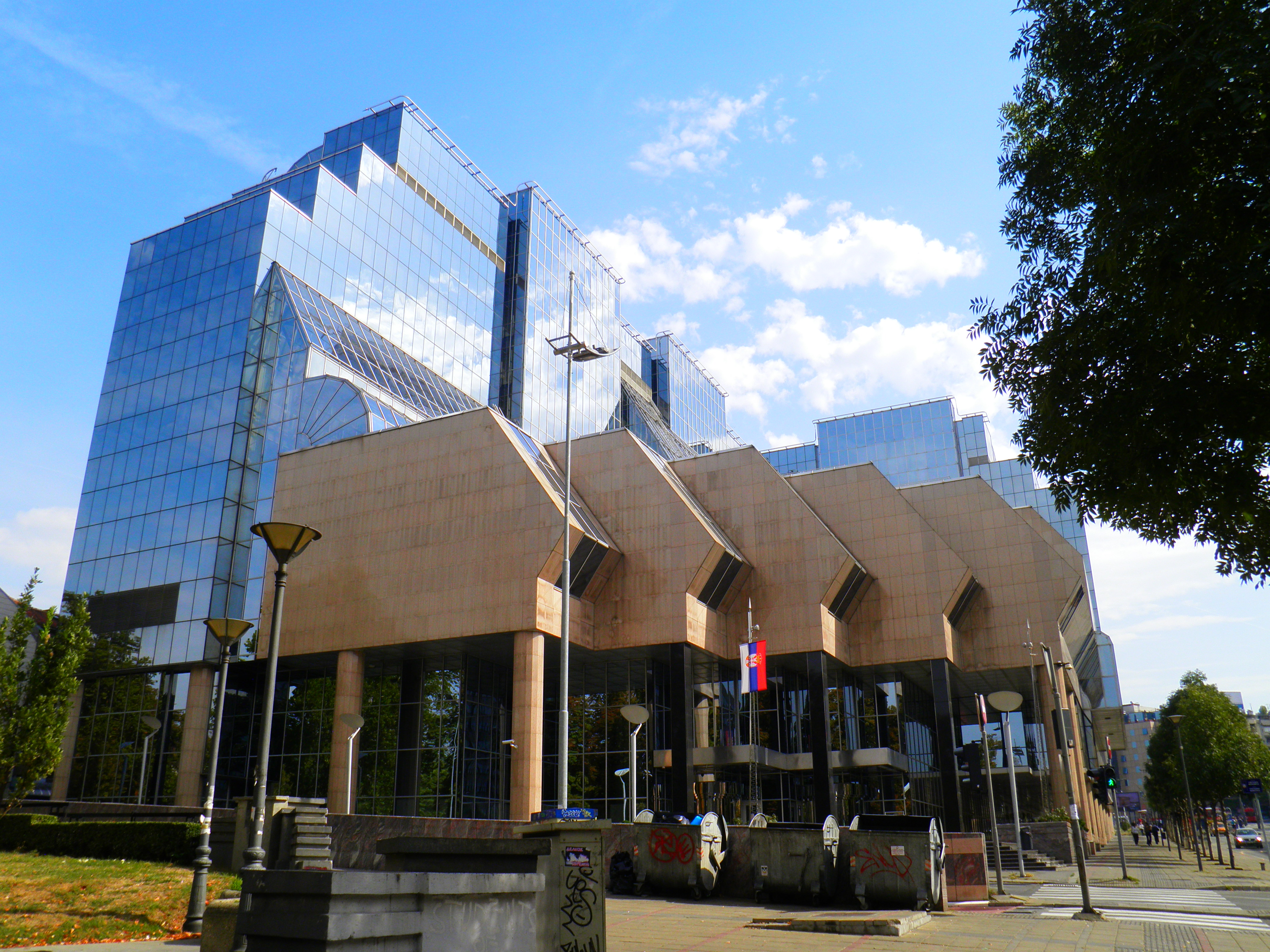 Zgrada Narodne banke Srbije